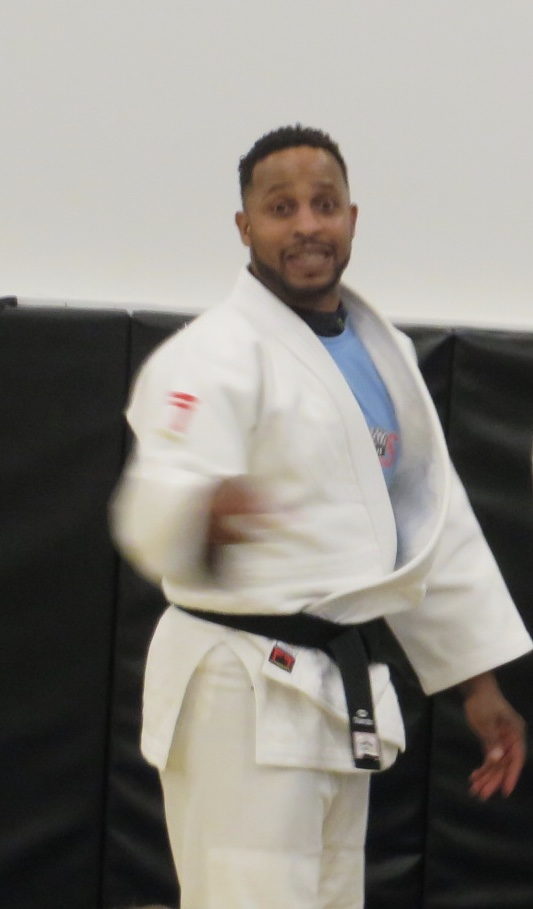 Ernst Laraque, judoka, plusieurs fois médaillés catégorie mois 73 kg et -71kg